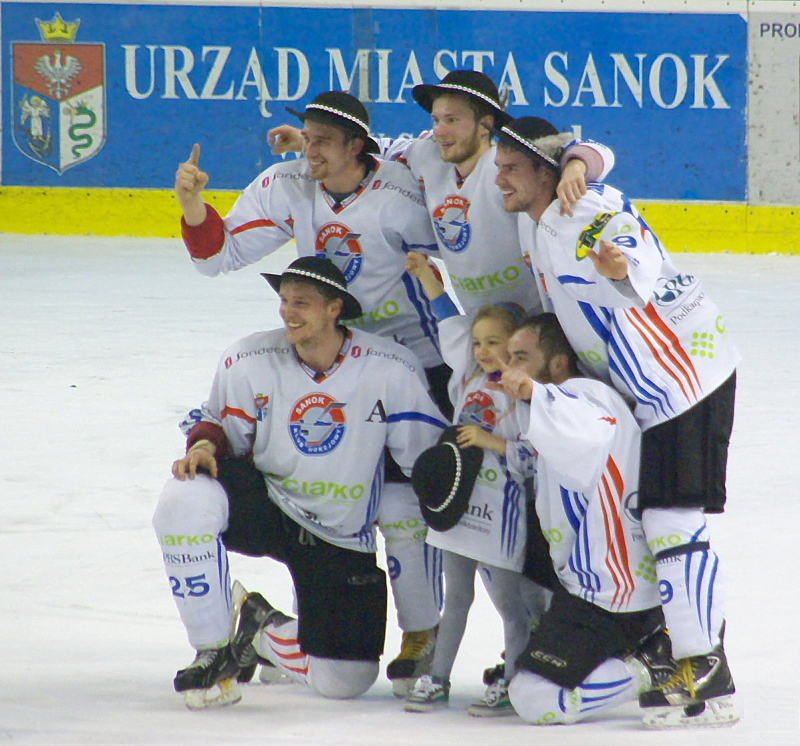 Wychowankowie Podhala Nowy Targ w barwach Ciarko PBS Bank Sanok po zdobyciu Mistrzostwa Polski 2011/2012 (Arena Sanok, 14 marca 2012)